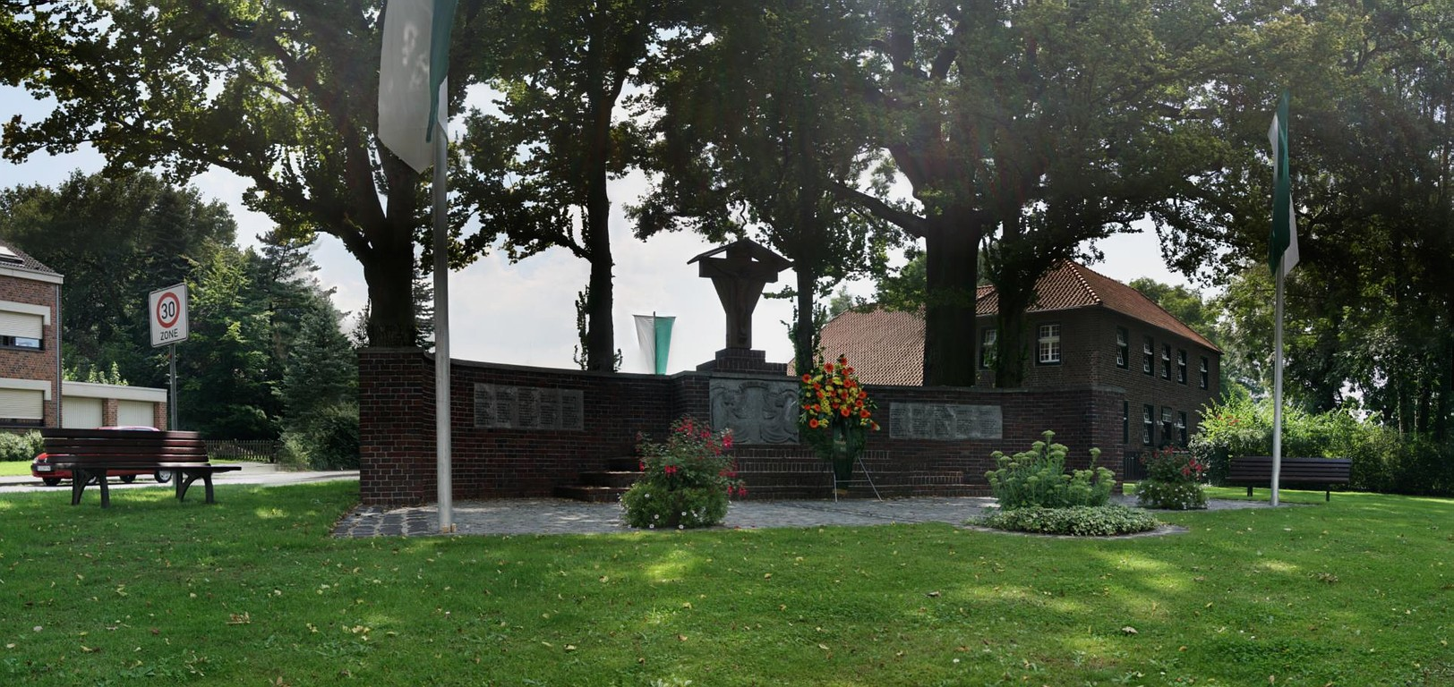 Ehrenmal in Oberbeberich, Beberich. Das Bild entstand beim Schützenfest der St. Hubertus Bruderschaft Viersen-Oberbeberich, die Fahnen hängen nicht ganzjährig.